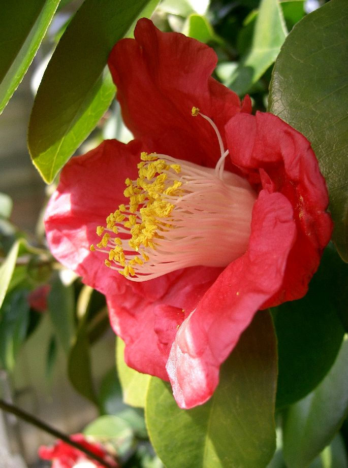 Camellia japonica